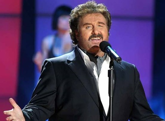 Krzysztof Krawczyk podczas rozdania Telekamer 2005